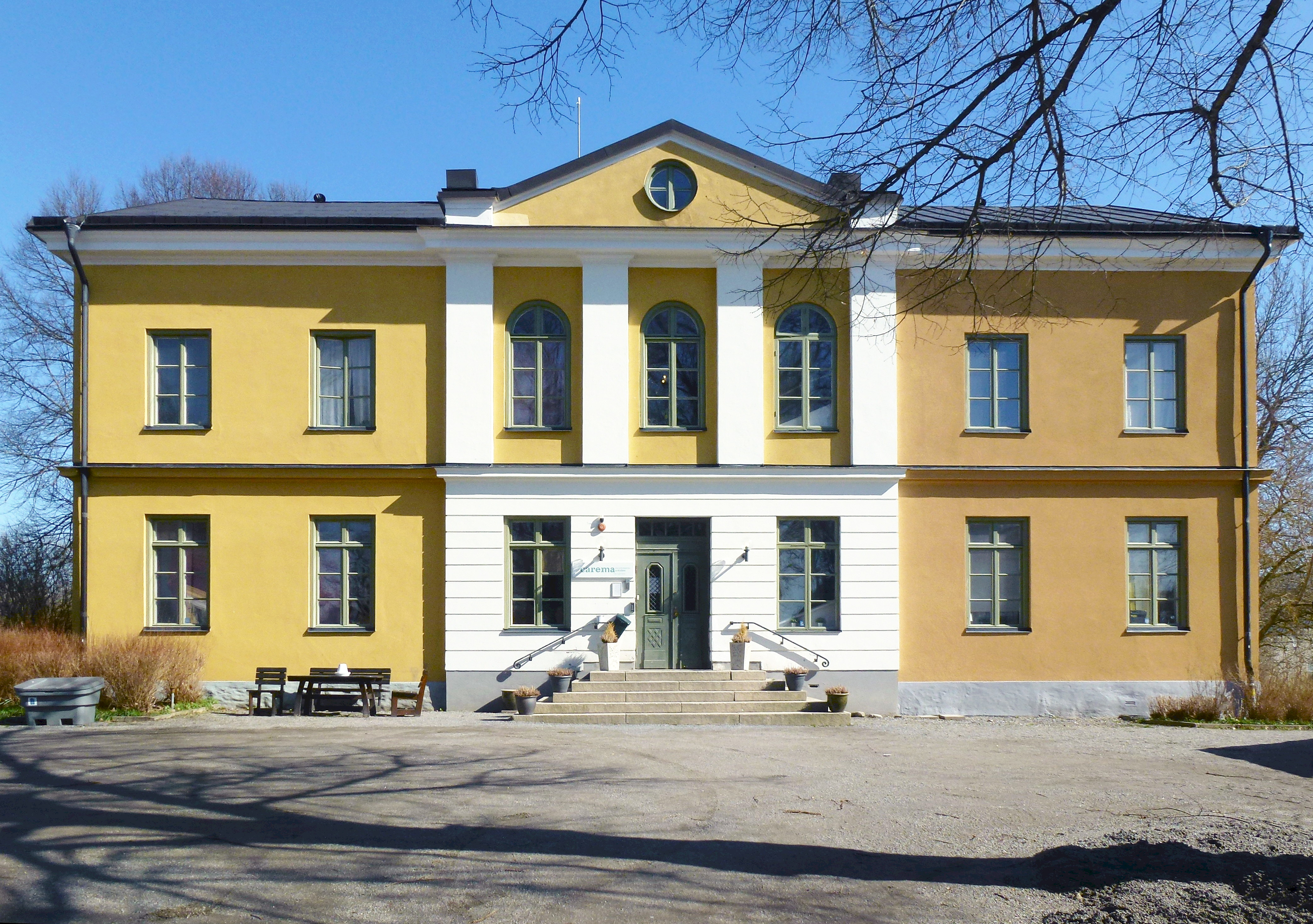 Skarpnäcks herrgård, huvudbyggnad